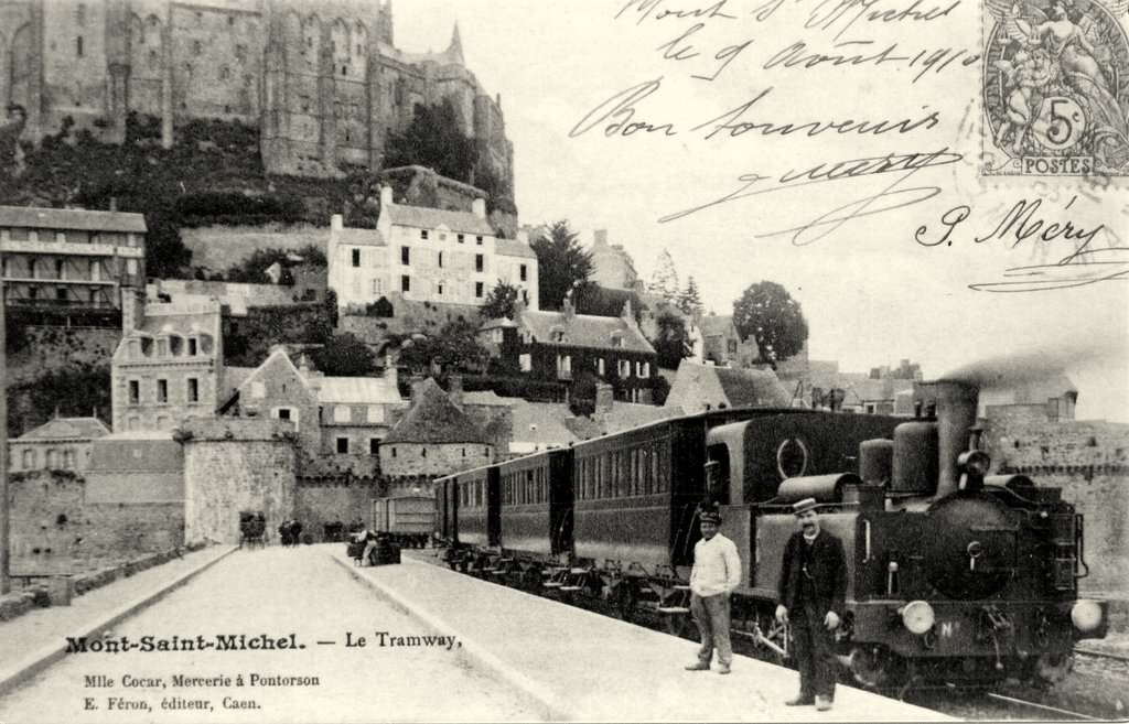 Vue d'une rame du tramway de la ligne de Pontorson au Mont-Saint-Michel en gare du Mont-Saint-Michel - vue d'un train vers 1910.